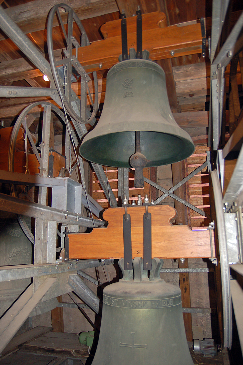 Mittlerer Teil des Glockenstuhls im Südturm der Bartholomäuskirche in Markgröningen. Oben: Taufglocke